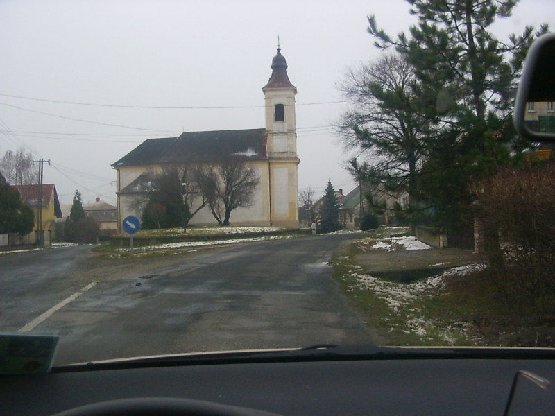 Tápszentmiklósi római katolikus templom